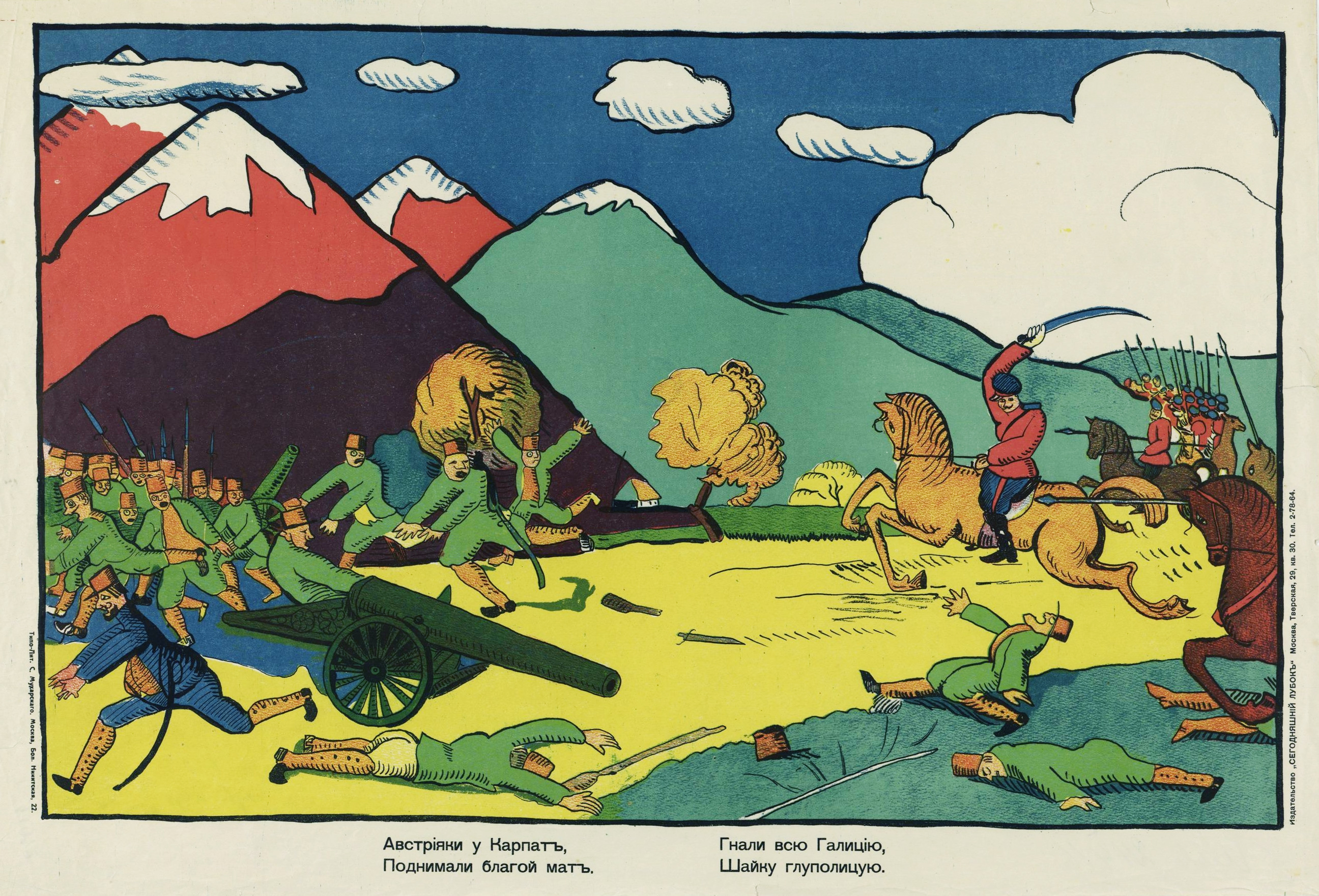 Сегодняшний Лубок. Австрияки у Карпат Поднимали благой мат.